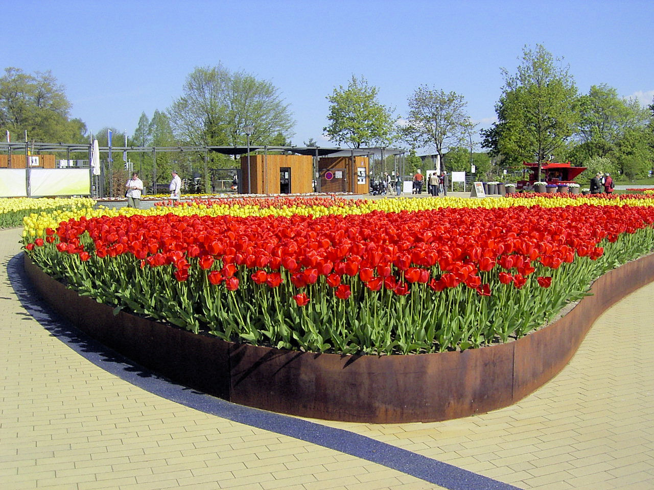 Eingang Mitte der Landesgartenschau in Rietberg